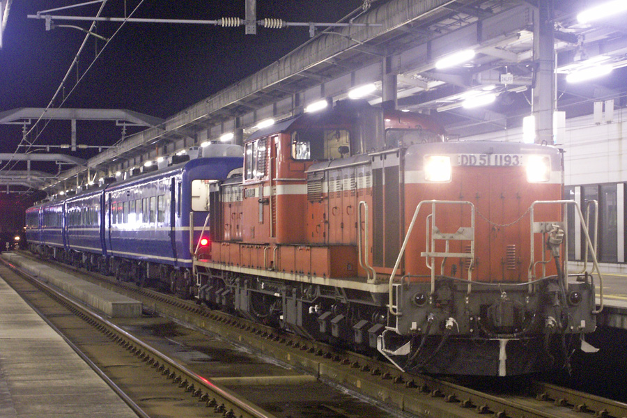 ムーンライト八重垣(出雲市駅/2005年1月)